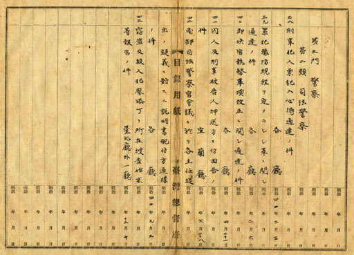 台灣總督府公文的報告